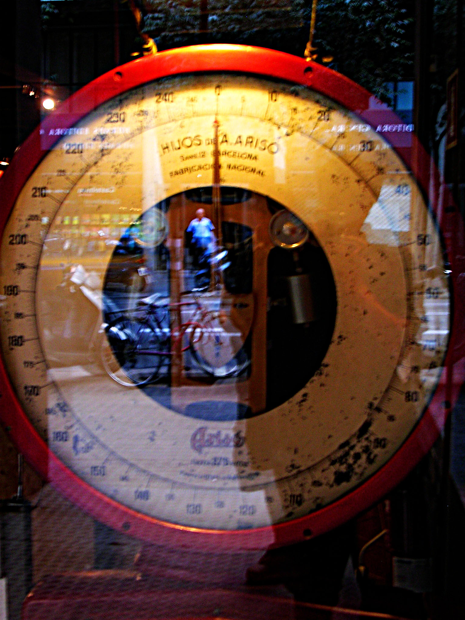 Bàscula Hijos de A. Arisó a la botiga Vinçon de Barcelona.